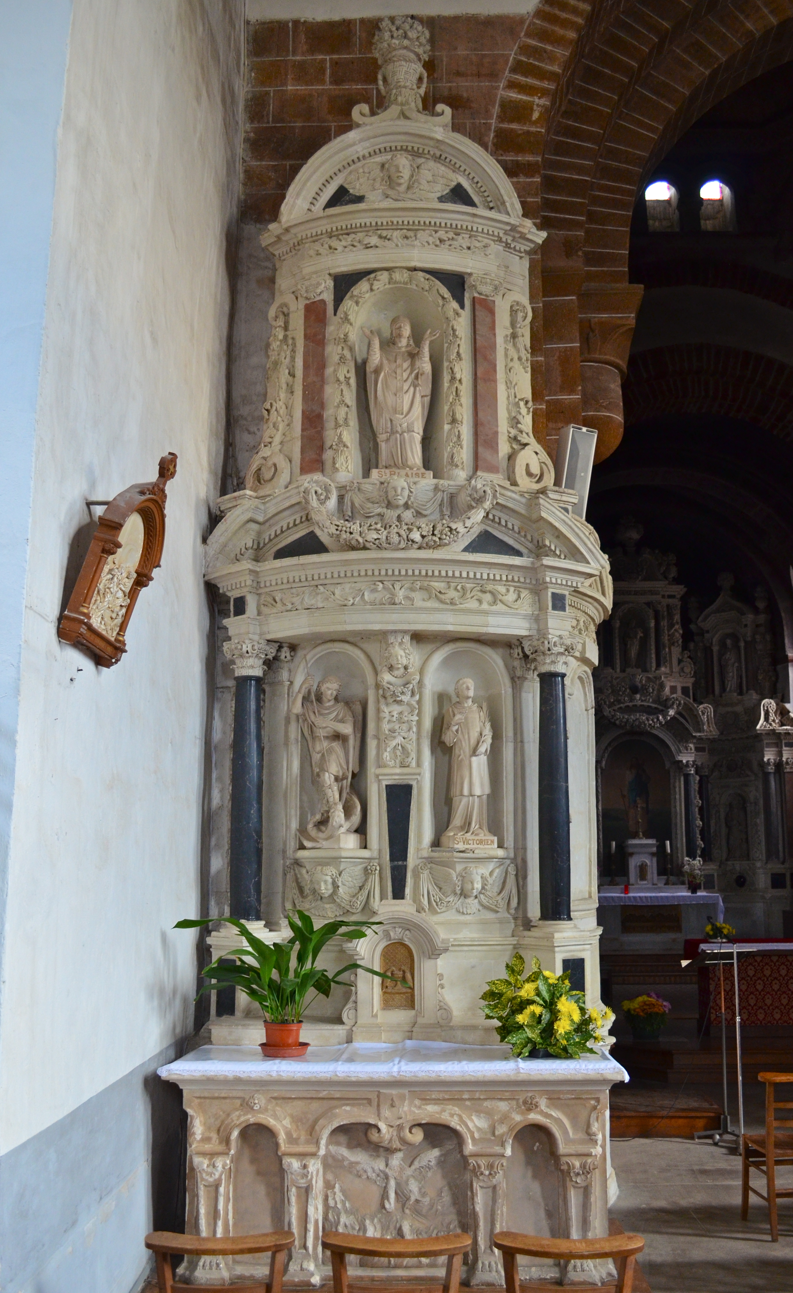 Eglise Saint-Jean de Béré - Châteaubriant (Loire-Atlantique)